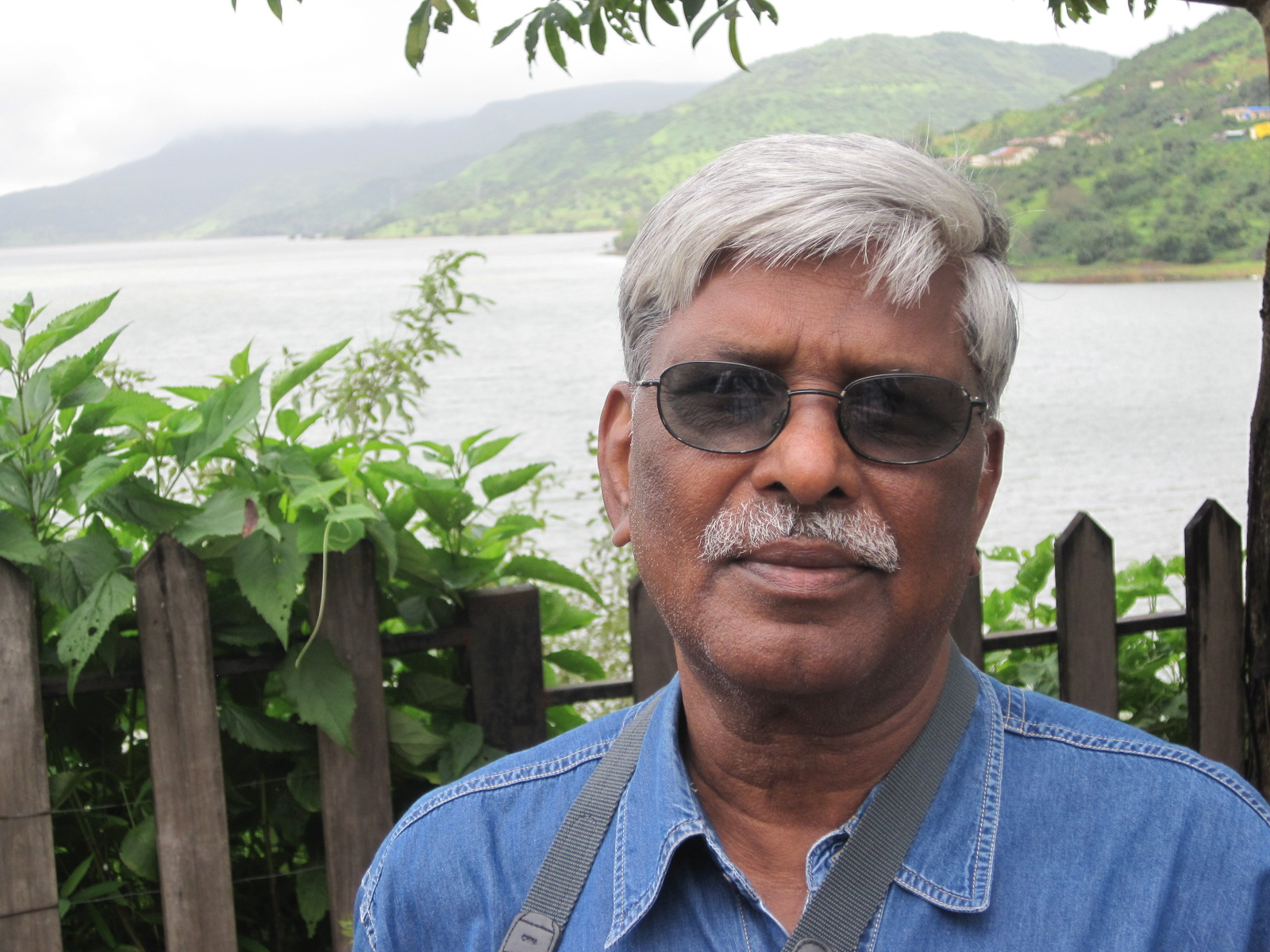 चंद्रकात नागेशराव पाटील